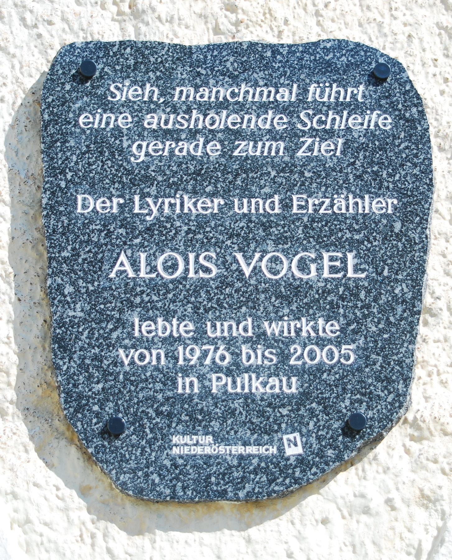 Gedenktafel für Alois Vogel im Hof des Pöltingerhofs in Pulkau (Niederösterreich)